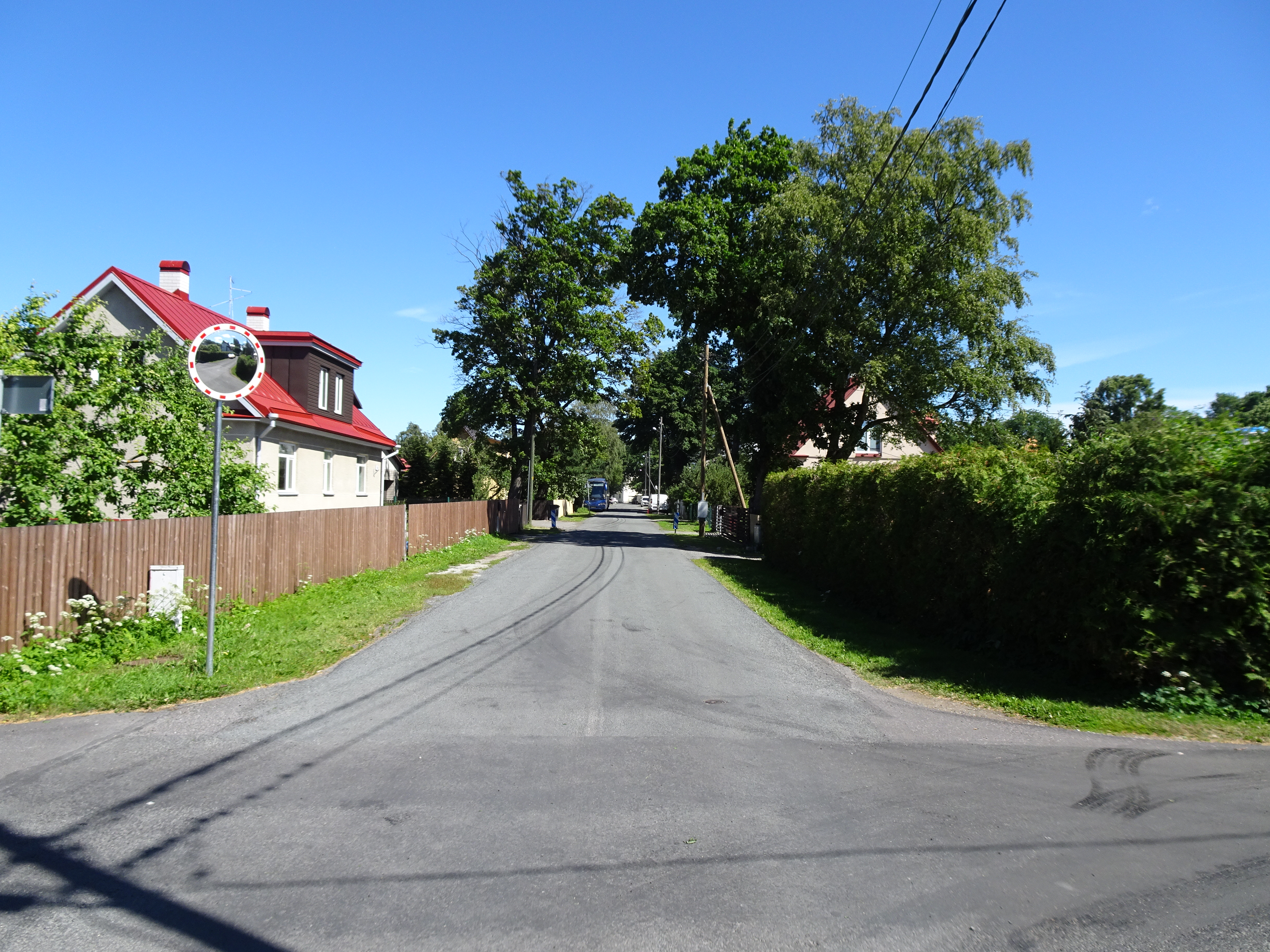 Ööbiku tänav Tallinnas